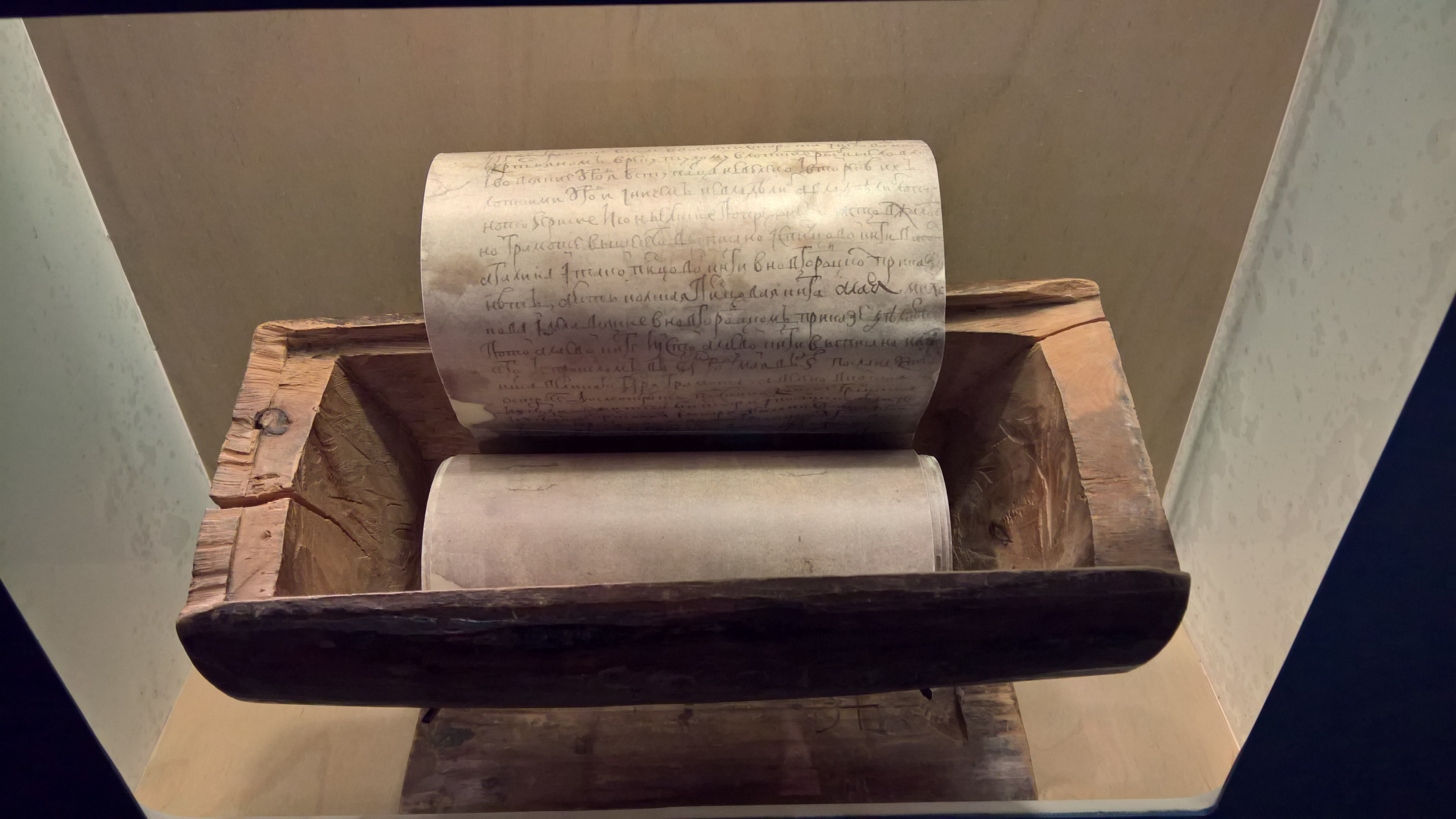 Kuva Gramota-arkistosta eli Kolttakylän arkistosta. Asiakirja on jäljennös, kotelo alkuperäinen. Gramota on Siidassa, Inarissa